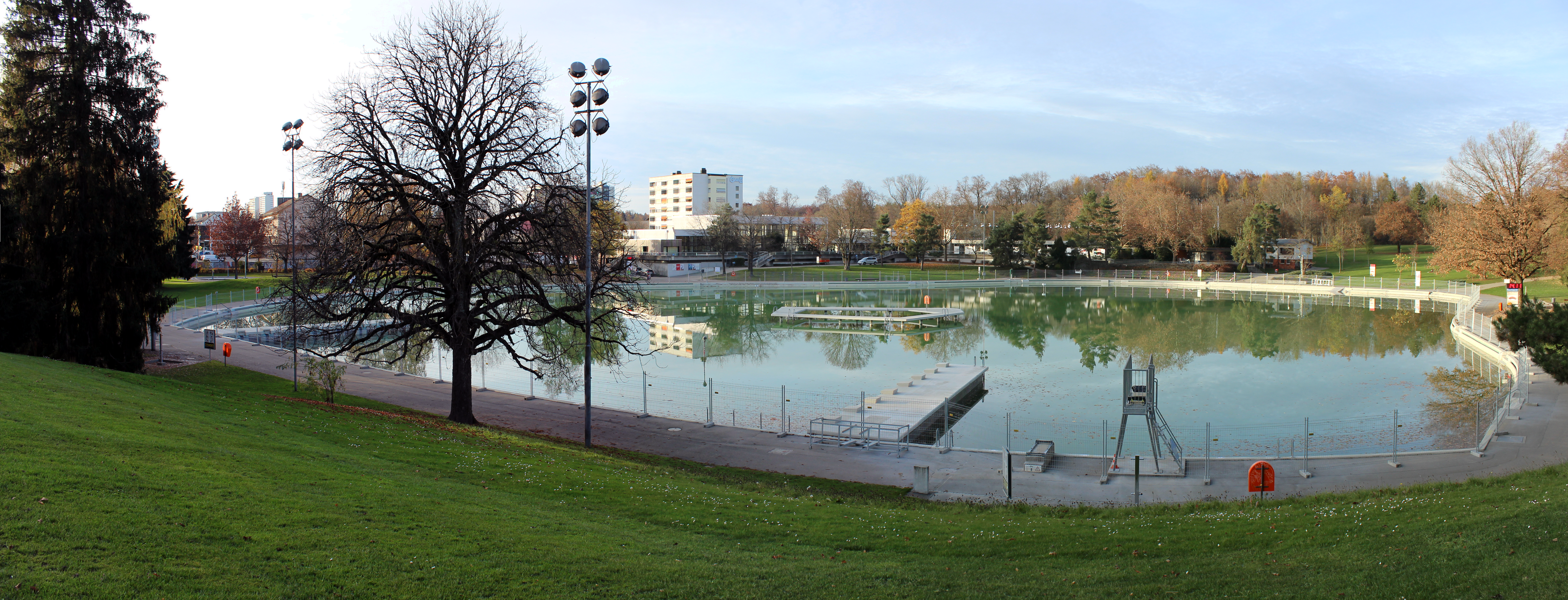 Panoramaaufnahme des Freibad-Hauptbeckens des Freibads Weyermannshaus.